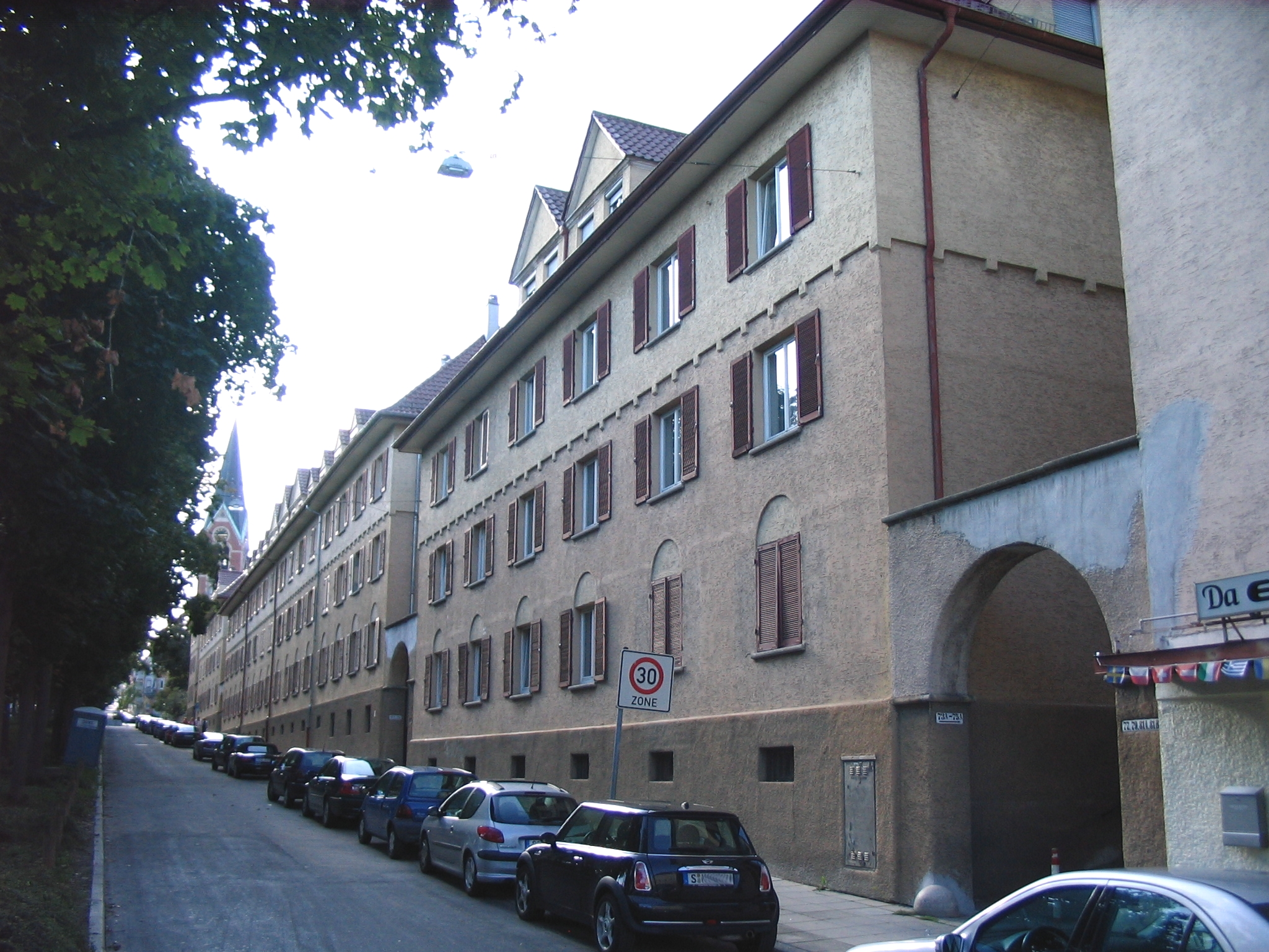 Die Stuttgarter Siedlung Rotenbergstraße von 1919/20 heute: Häuserzeile in der Rotenbergstraße, Blick nach Westen Richtung Lukaskirche.